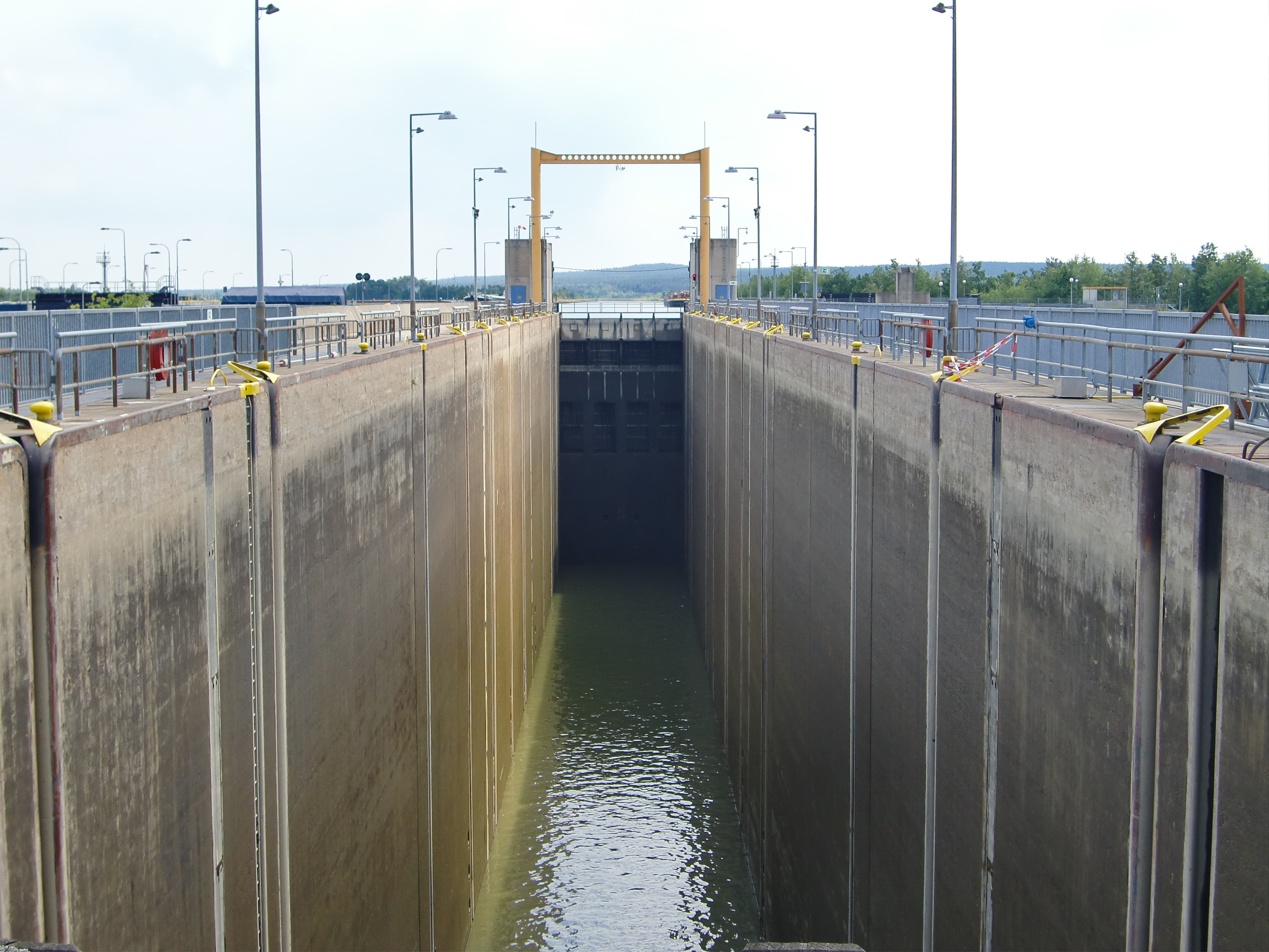 Schleuse Uelzen (Elbe-Seitenkanal)